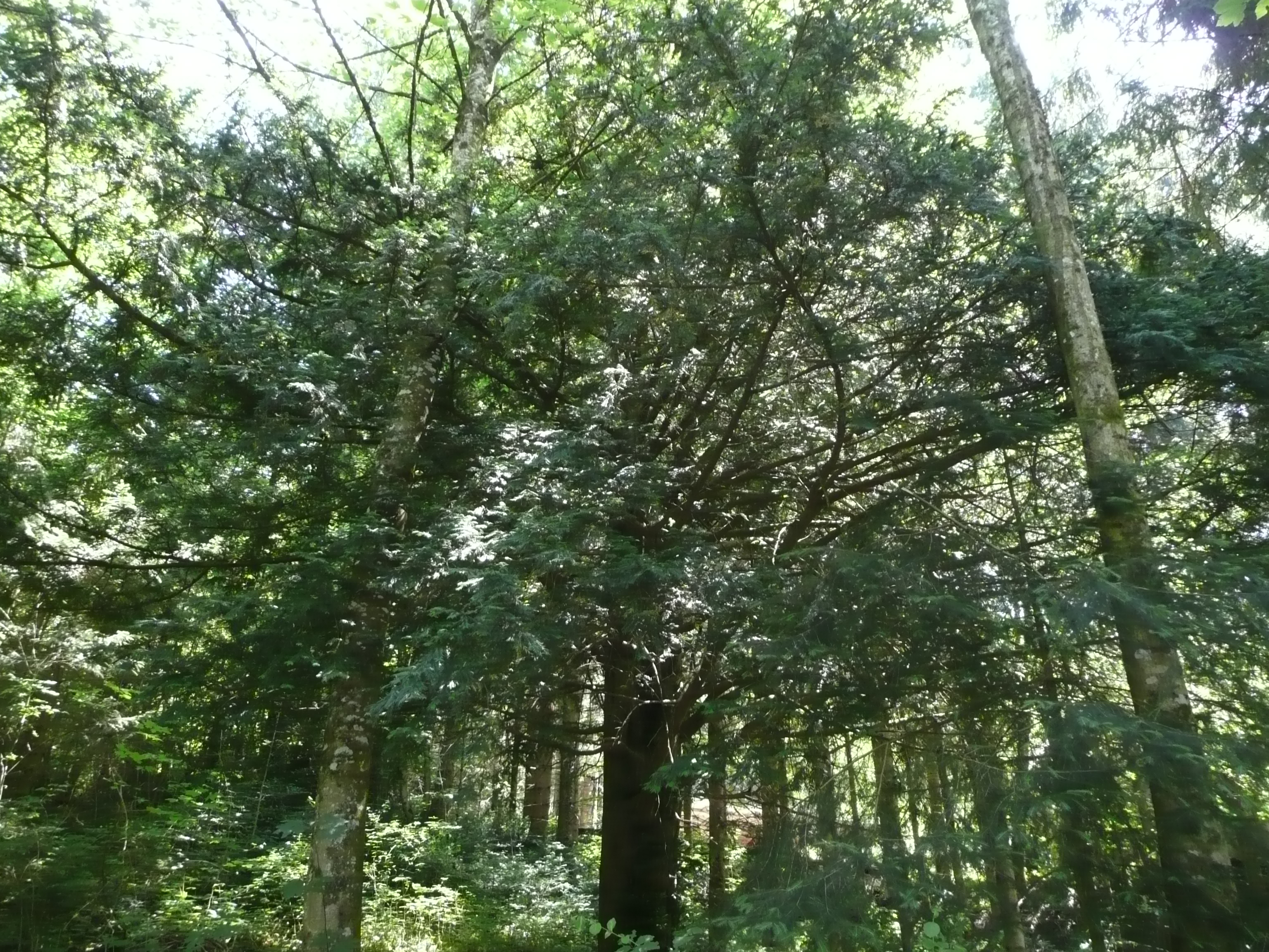 Eibe in Steckenwegen This media shows the natural monument in Vorarlberg with the ID 187.